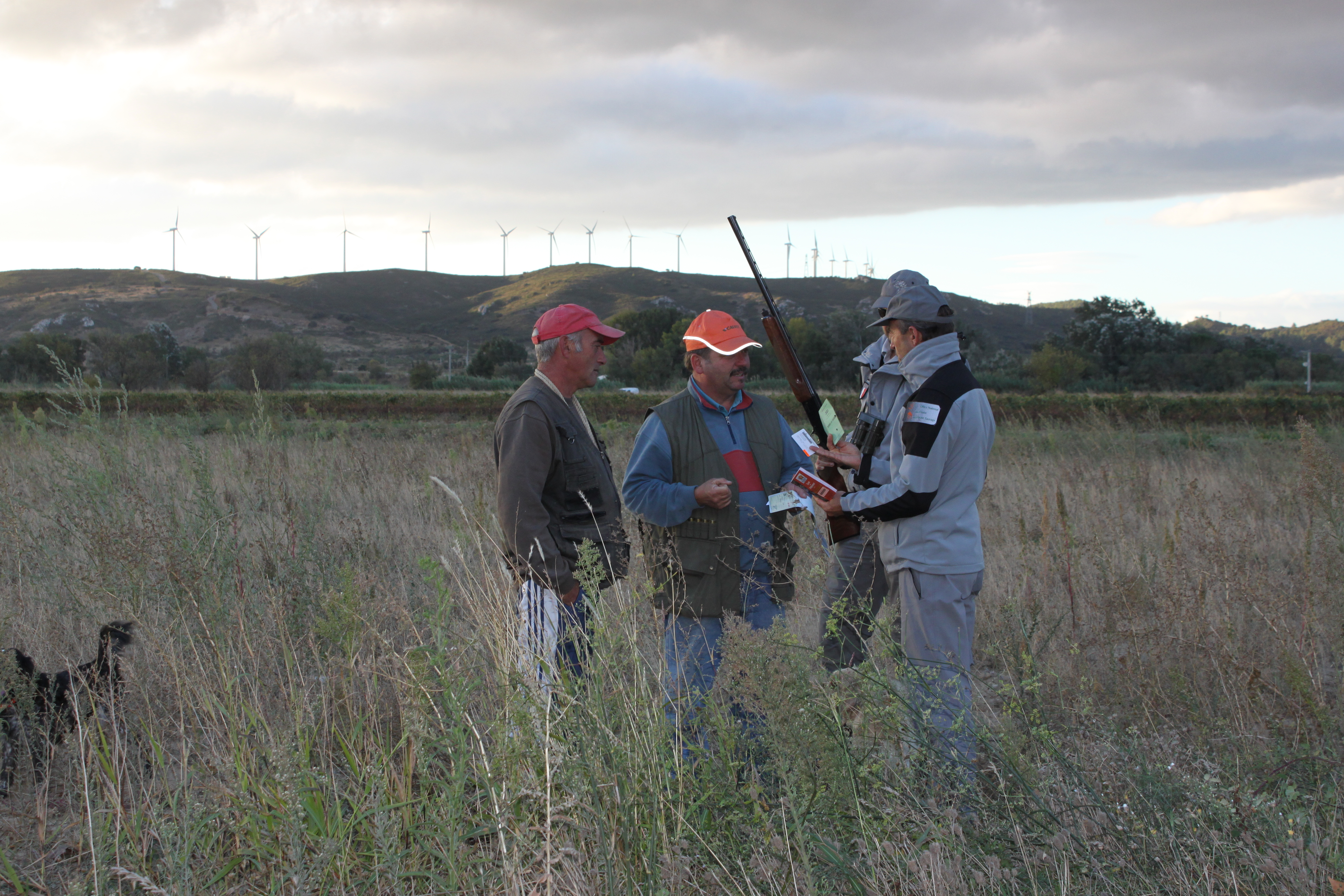 Agents de l'ONCFS Contrôle de chasseurs CANET D'AUDE AUDE